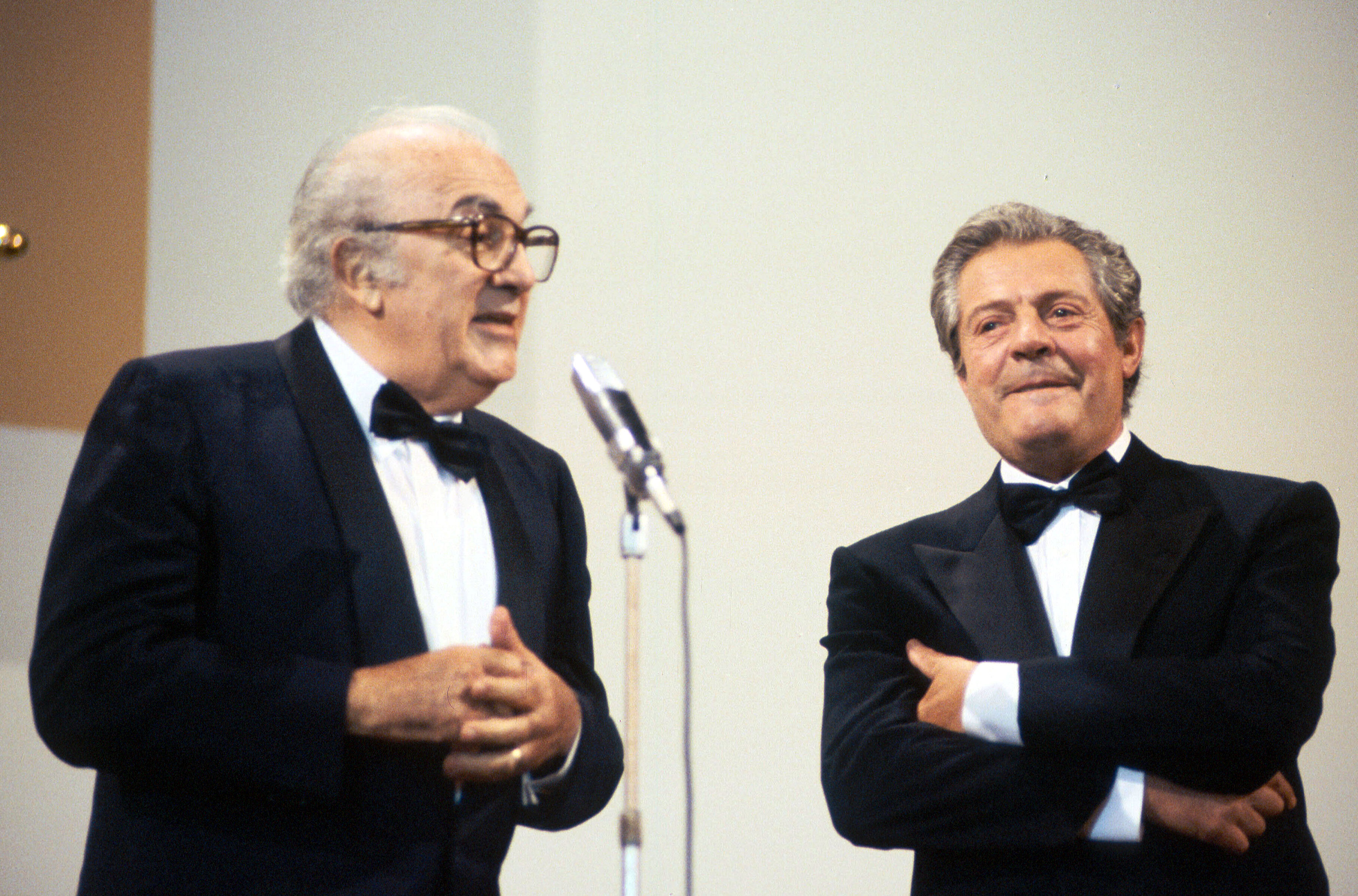 L'attore Marcello Mastroianni alla Mostra del Cinema di Venezia del 1990 con Federico Fellini